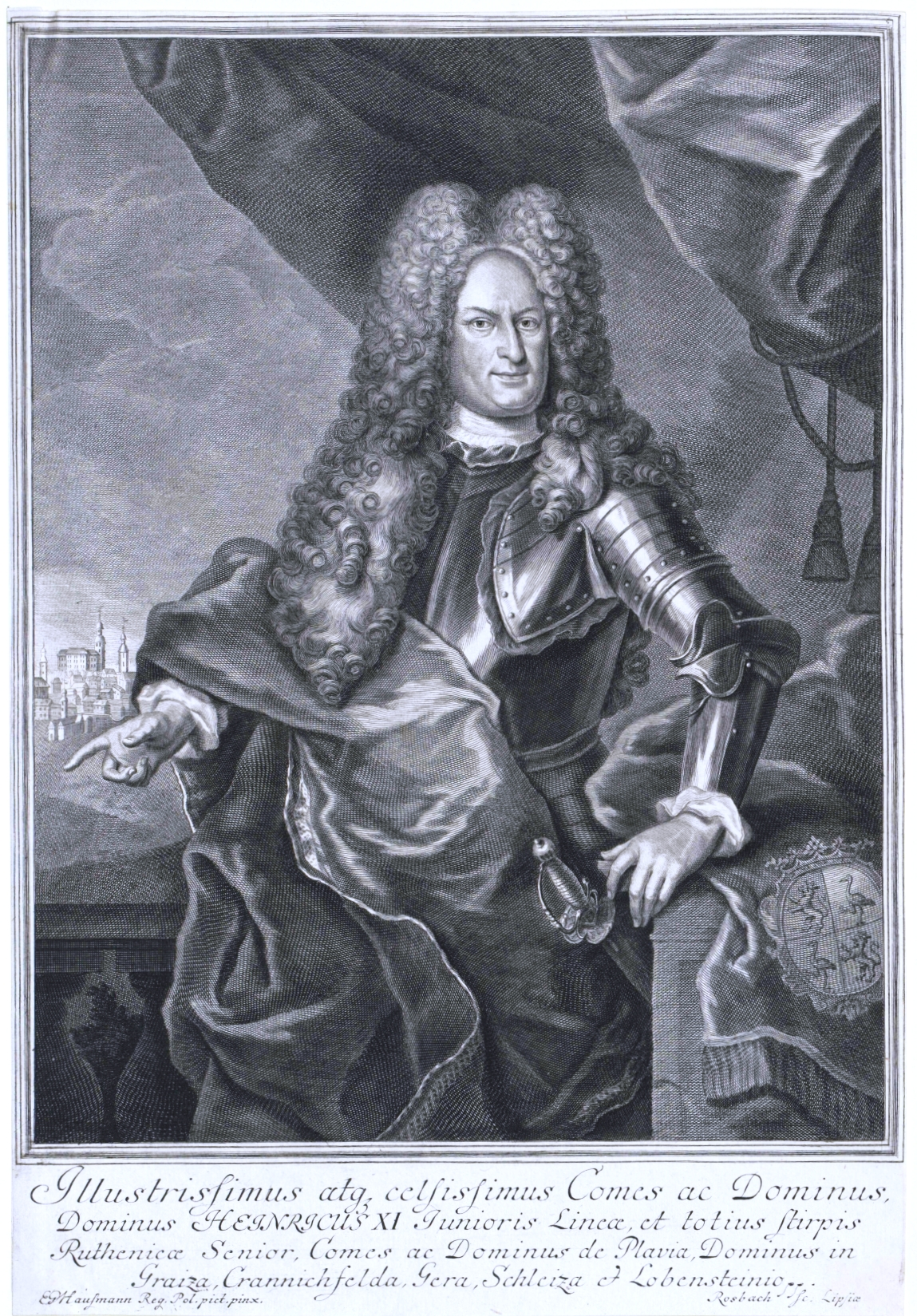 Heinrich XI., Graf Reuß zu Schleiz (1669–1726)